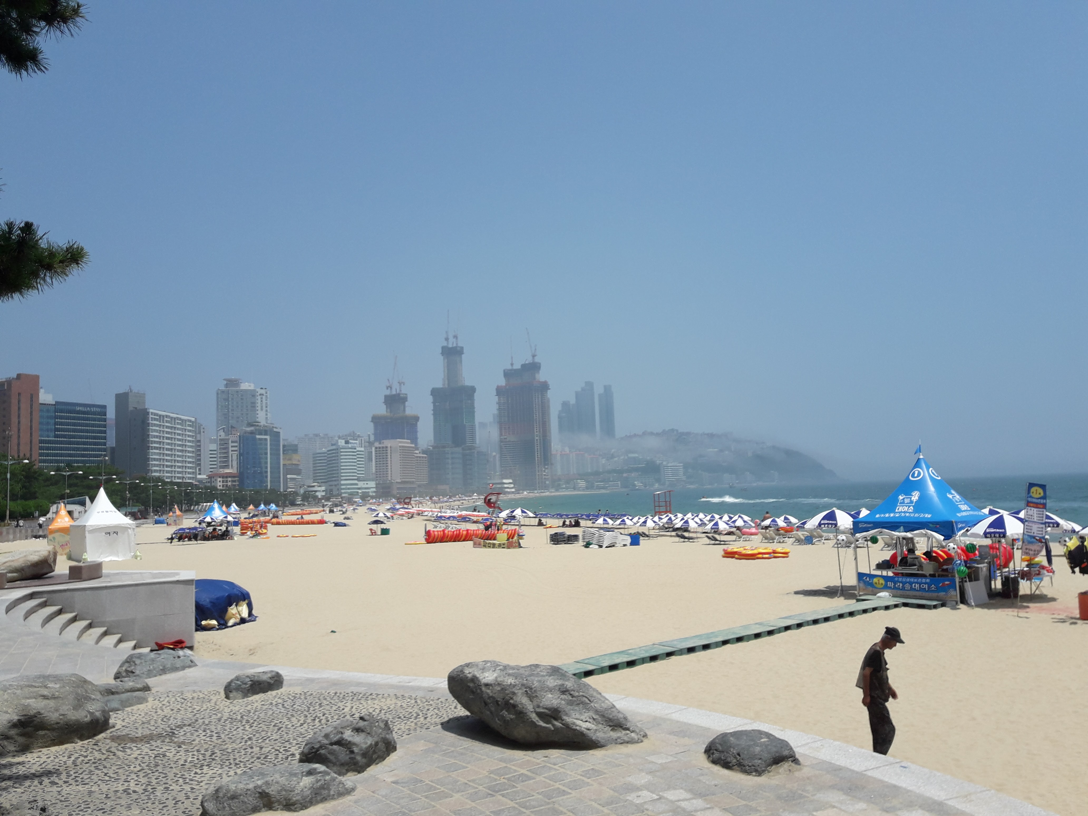 韓國釜山海雲台區海云台海滩